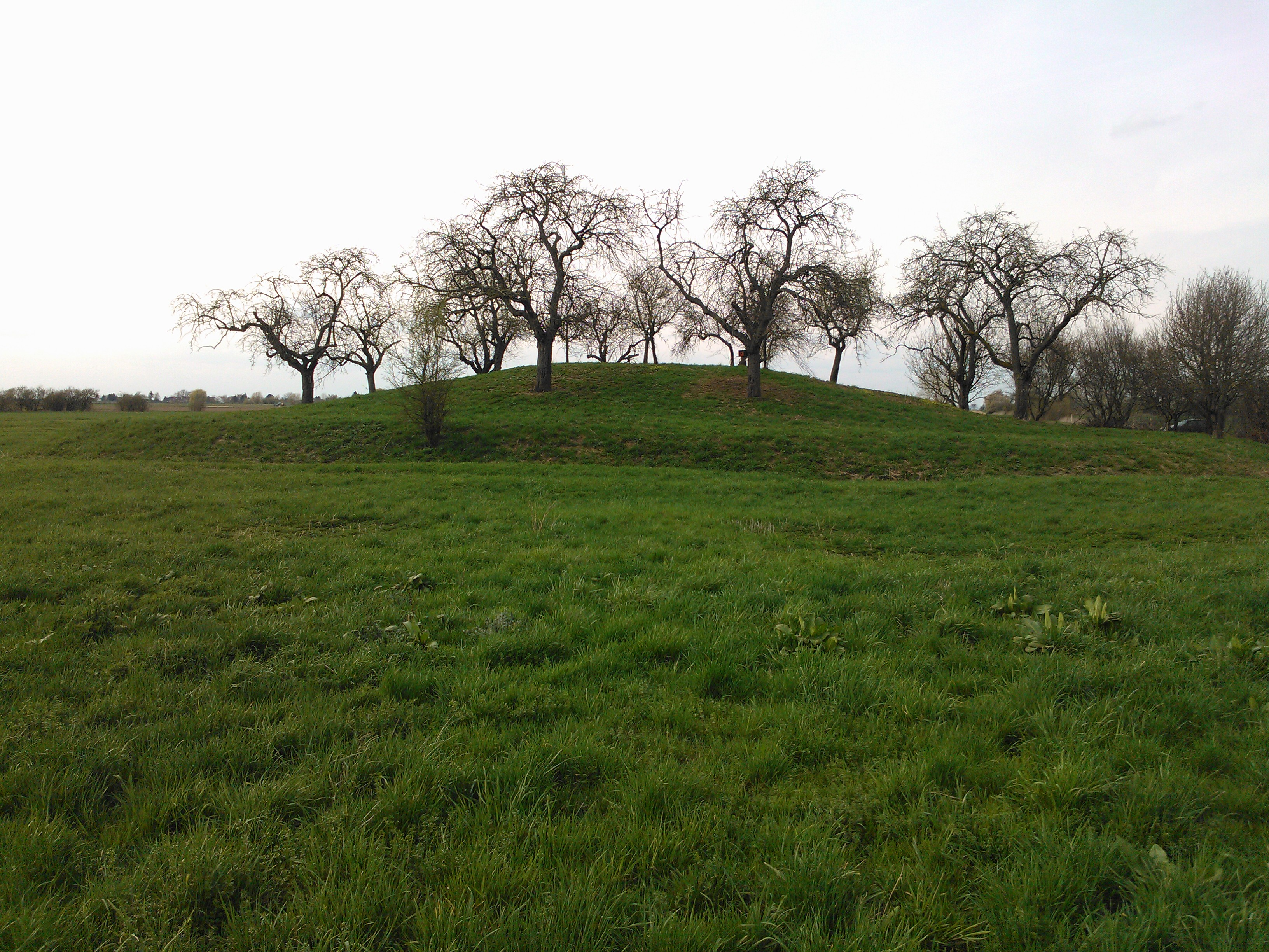 Burgstall der abgegangenen Motte Wellberg südlich von Pfungstadt, Landkreis Darmstadt-Dieburg, Hessen. Aufnahme aus Südwesten. Wallanlage und Erhebung für die Motte ist deutlich zu erkennen.